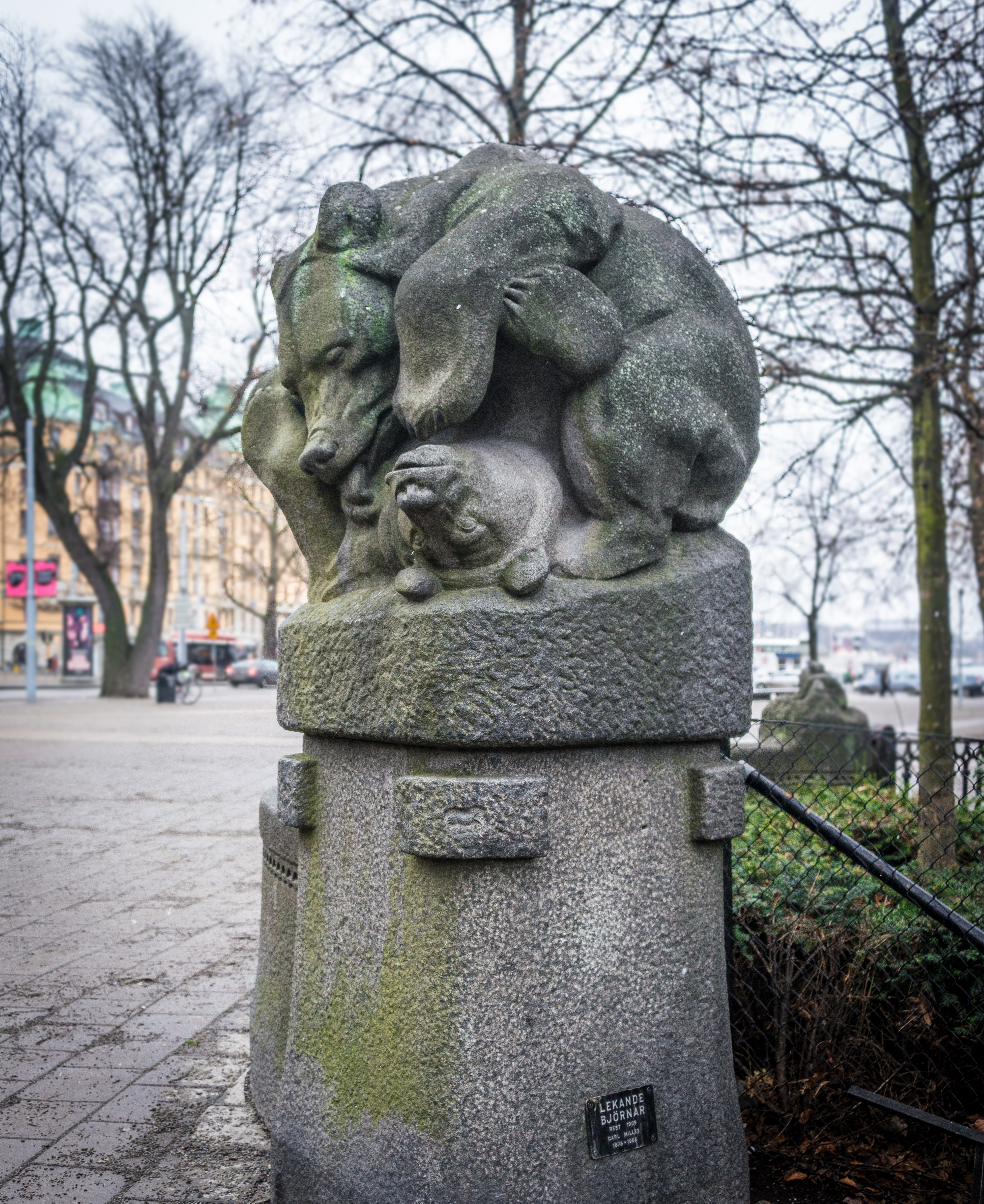 Carl Milles skulptur Lekande björnar i Berzelii park i Stockholm i februari 2017.